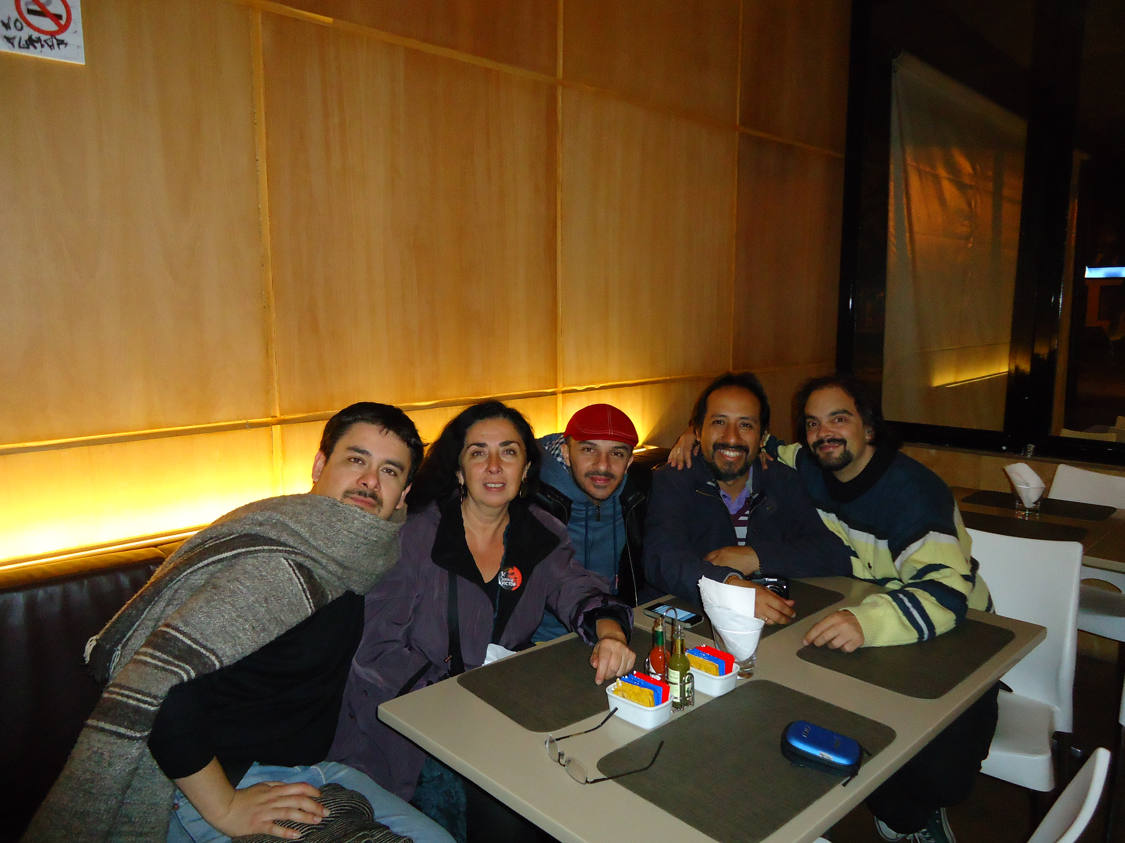 Dándole Cuerda (Bolivia, 2013)